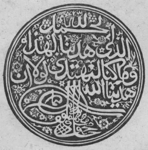 Biblothekssiegel mit Tughra Mahmuds I. und einem Koranzitat aus Sure 7:44